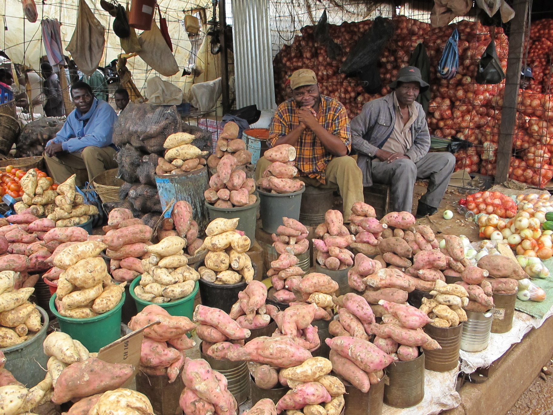 Mbare market, 31 January 2010, Harare